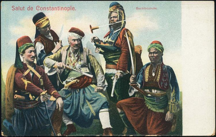 Башибозук.